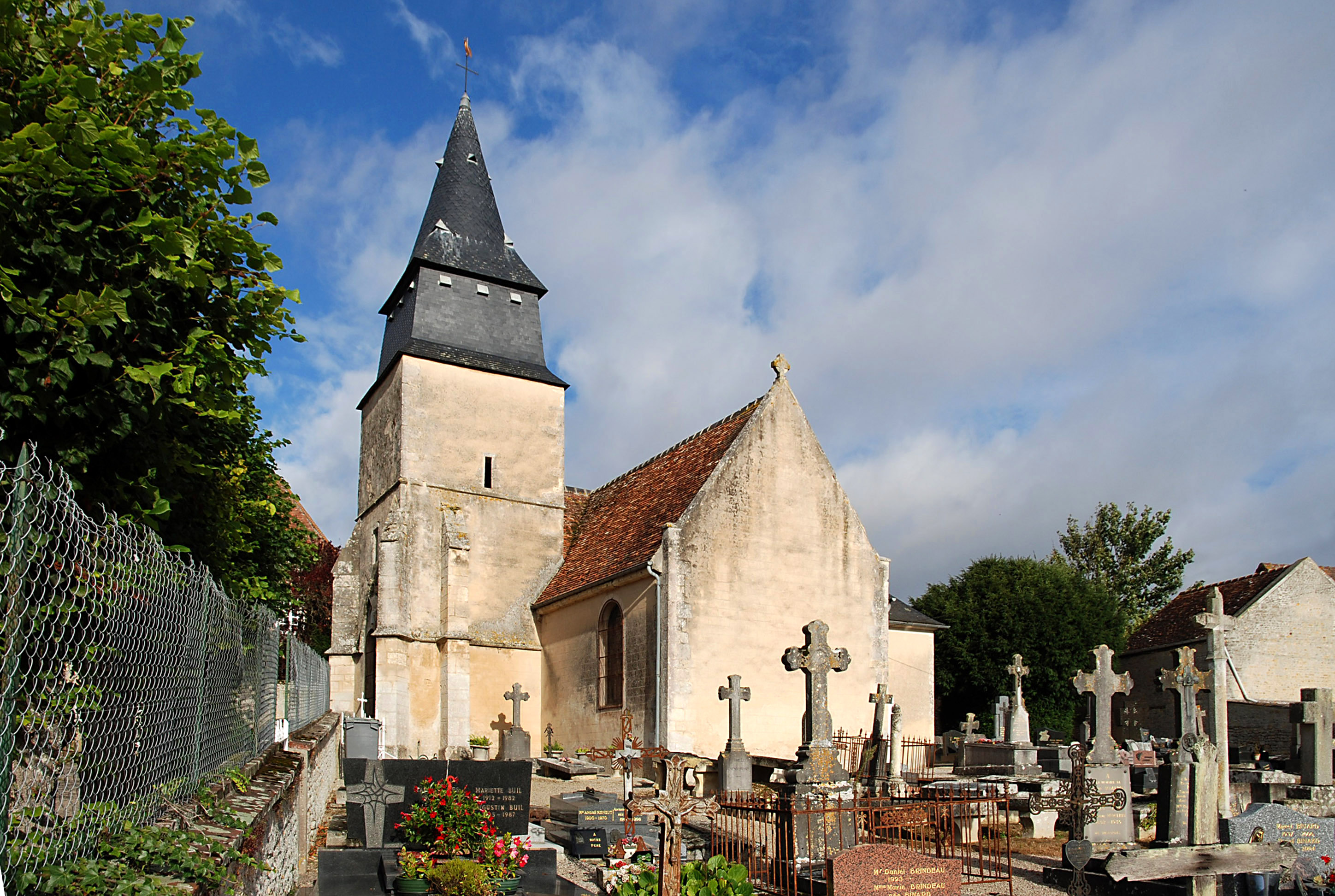 Villy-lez-Falaise (Calvados)